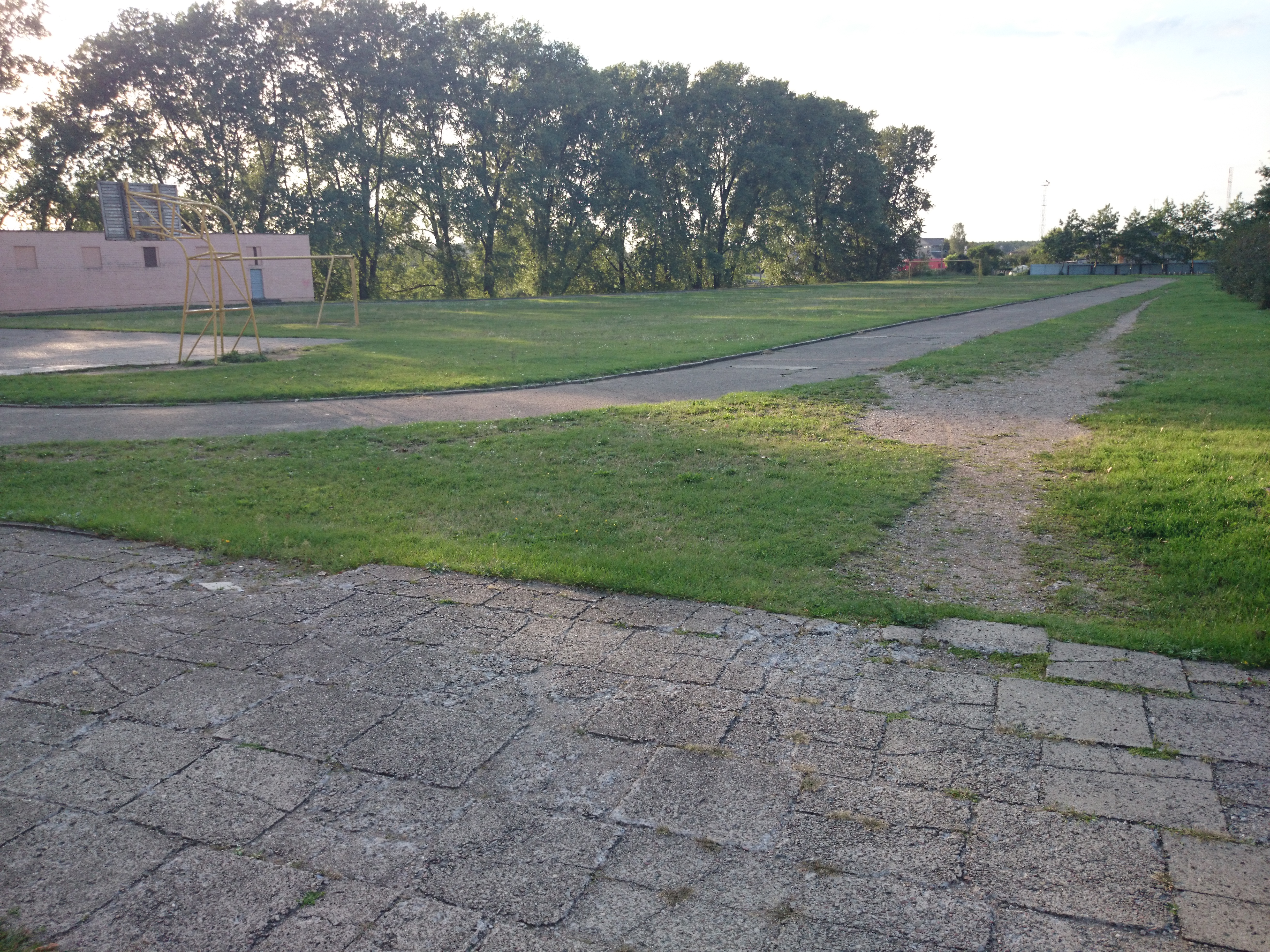 Lietavos pagrindinė mokykla